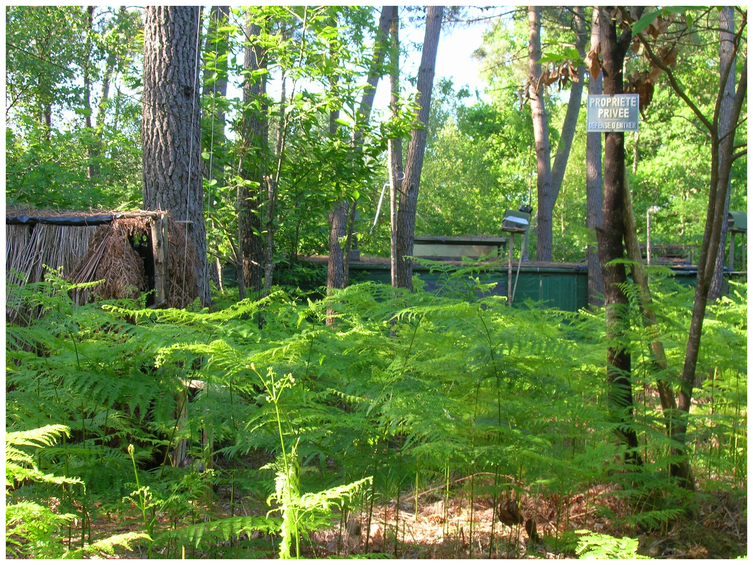 Poste de contrôle d'une palombière au sol en Sud Gironde